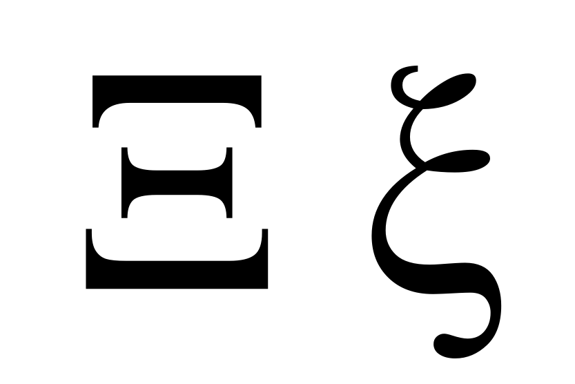 greek letter xi